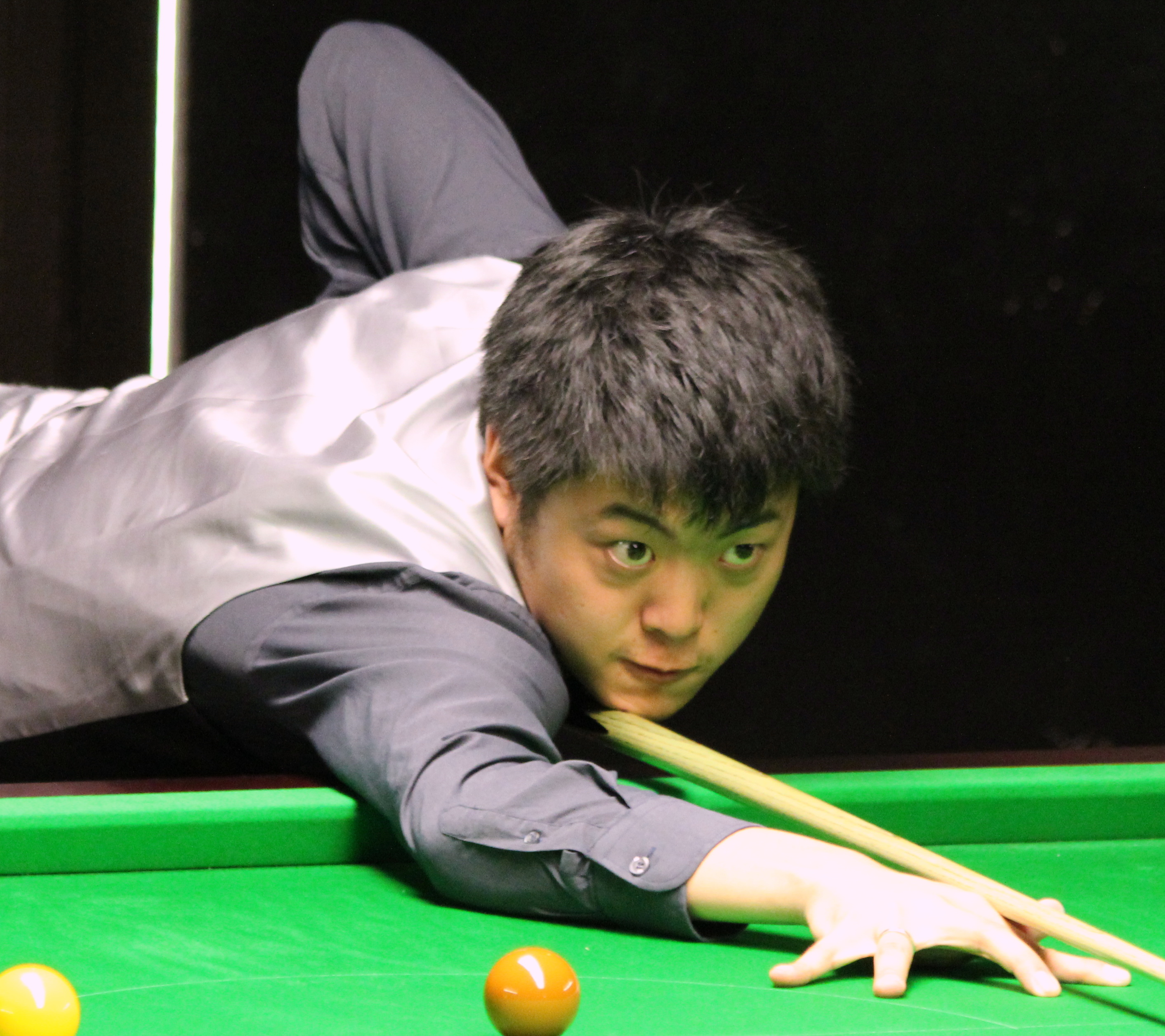 Liang Wenbo beim Paul Hunter Classic 2012